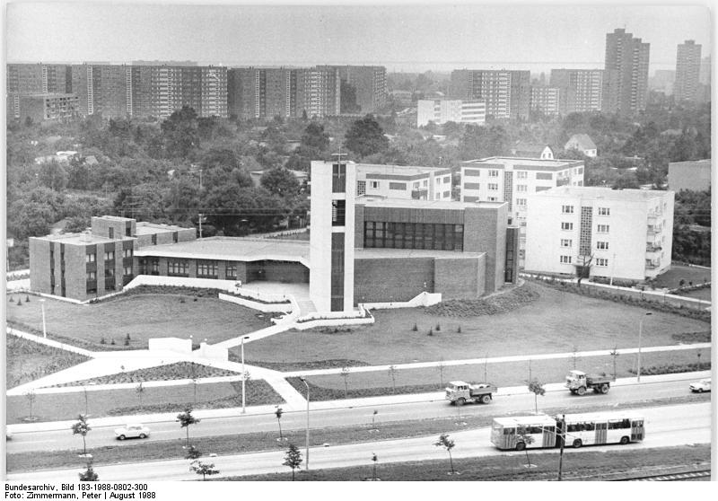 ADN-ZB-Zimmermann-2.8.88--Berlin: Eine Pfarrkirche "Von der Verklärung des Herrn" und ein katholisches Gemeindezentrum befindet sich unweit des S-Bahnhofes Berlin-Marzahn in der Leninallee. Die Kirchweihe fand am 30.10.1987 statt. Die Kirche hat 350 Sitzplätze und ebensoviele Stehplätze."